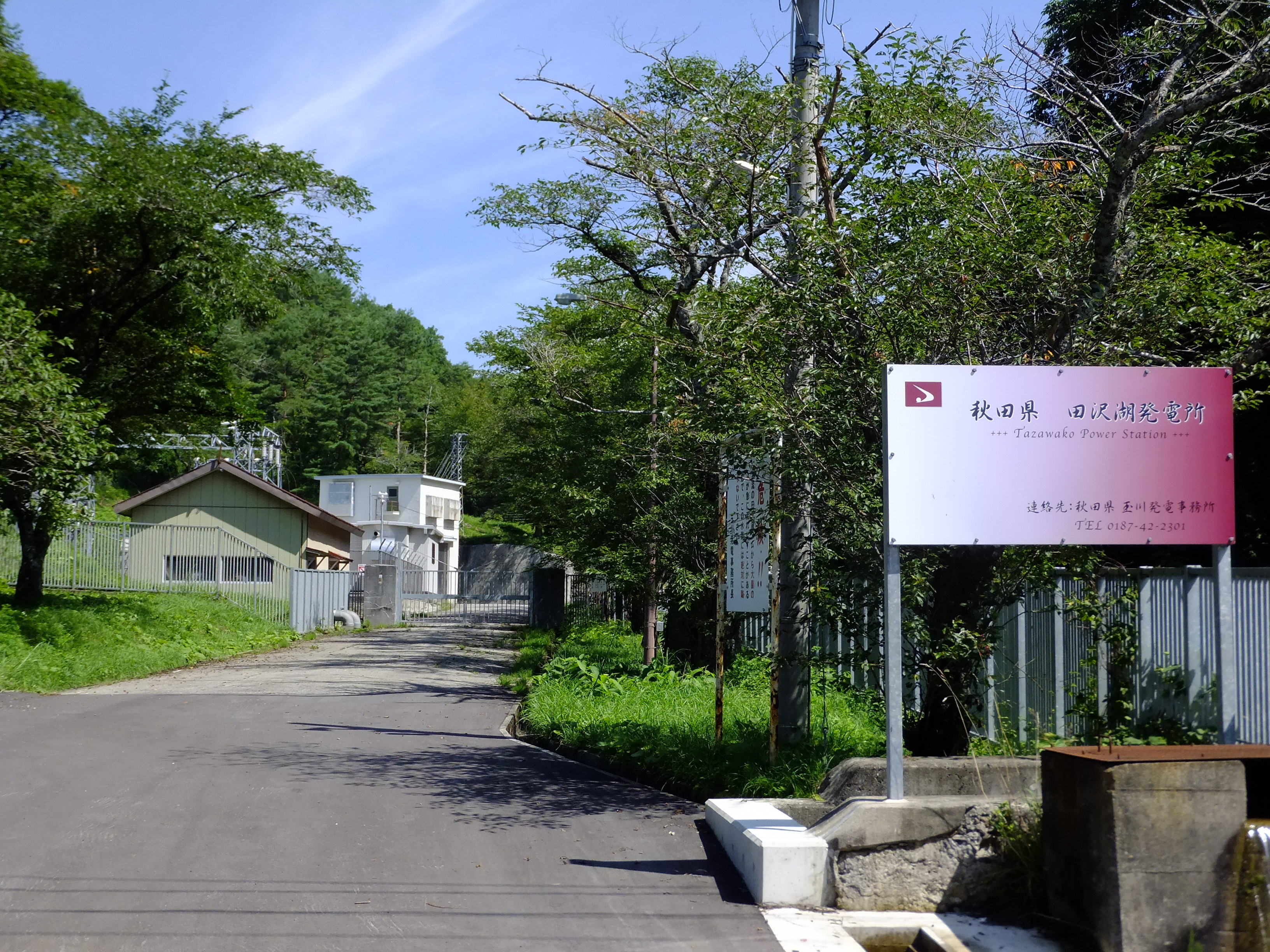 田沢湖発電所(秋田県仙北市)